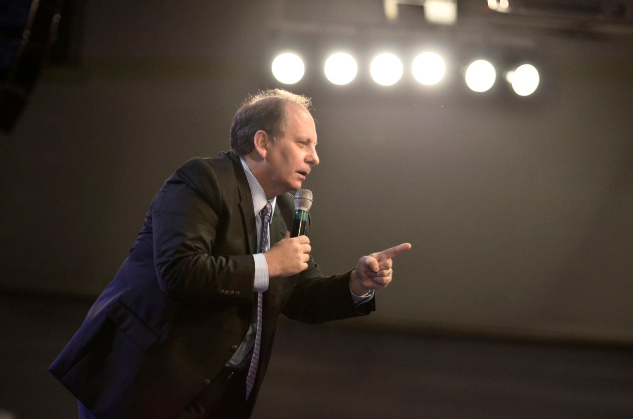 Lamartine Posella